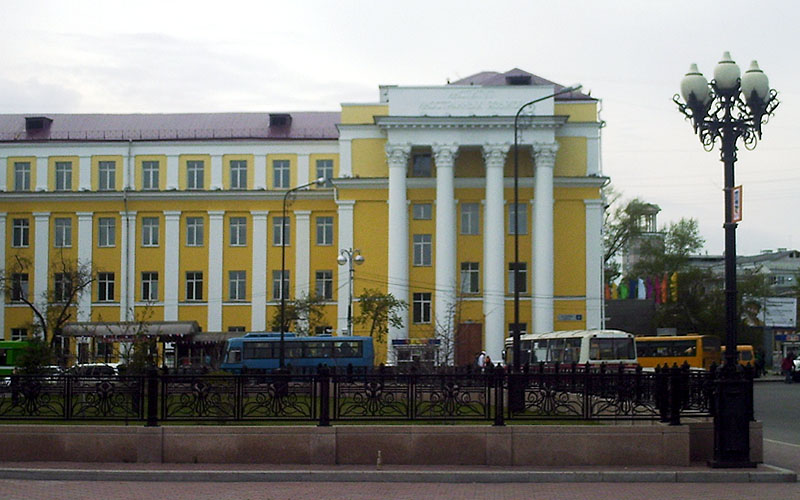 Свежевыкрашенное здание Иркутского государственного лингвистического университета